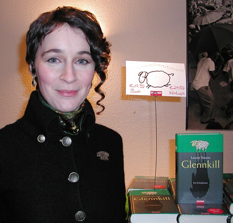 Autorin Leonie Swann bei einer Buchvorstellung in Nordenham